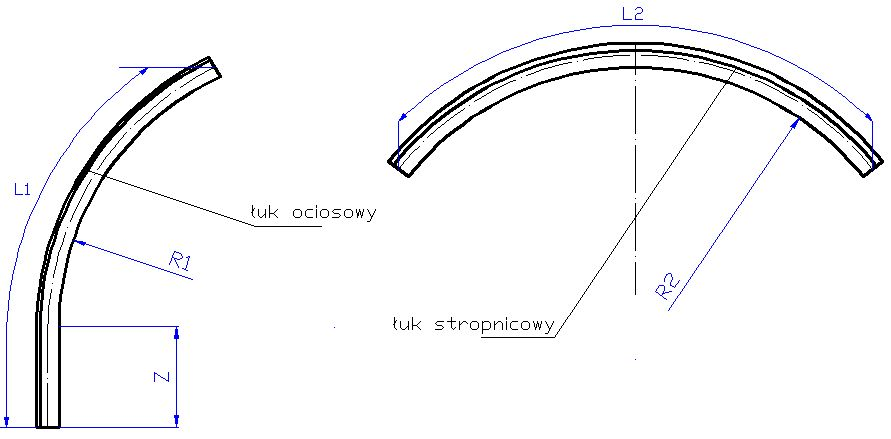 Stahlbogenausbau